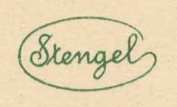 Ponttor